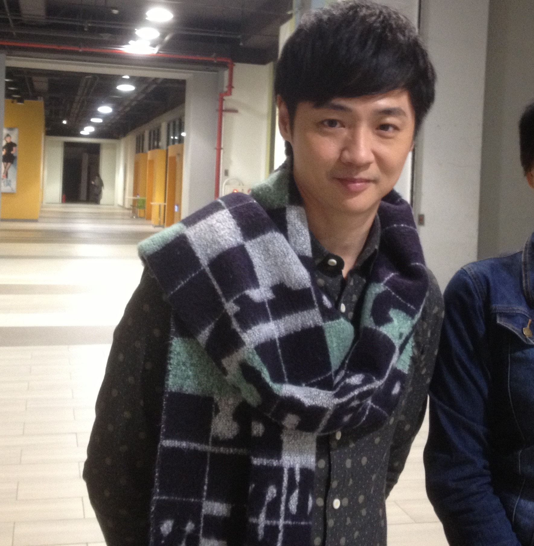 宋逸民.IMG 1391